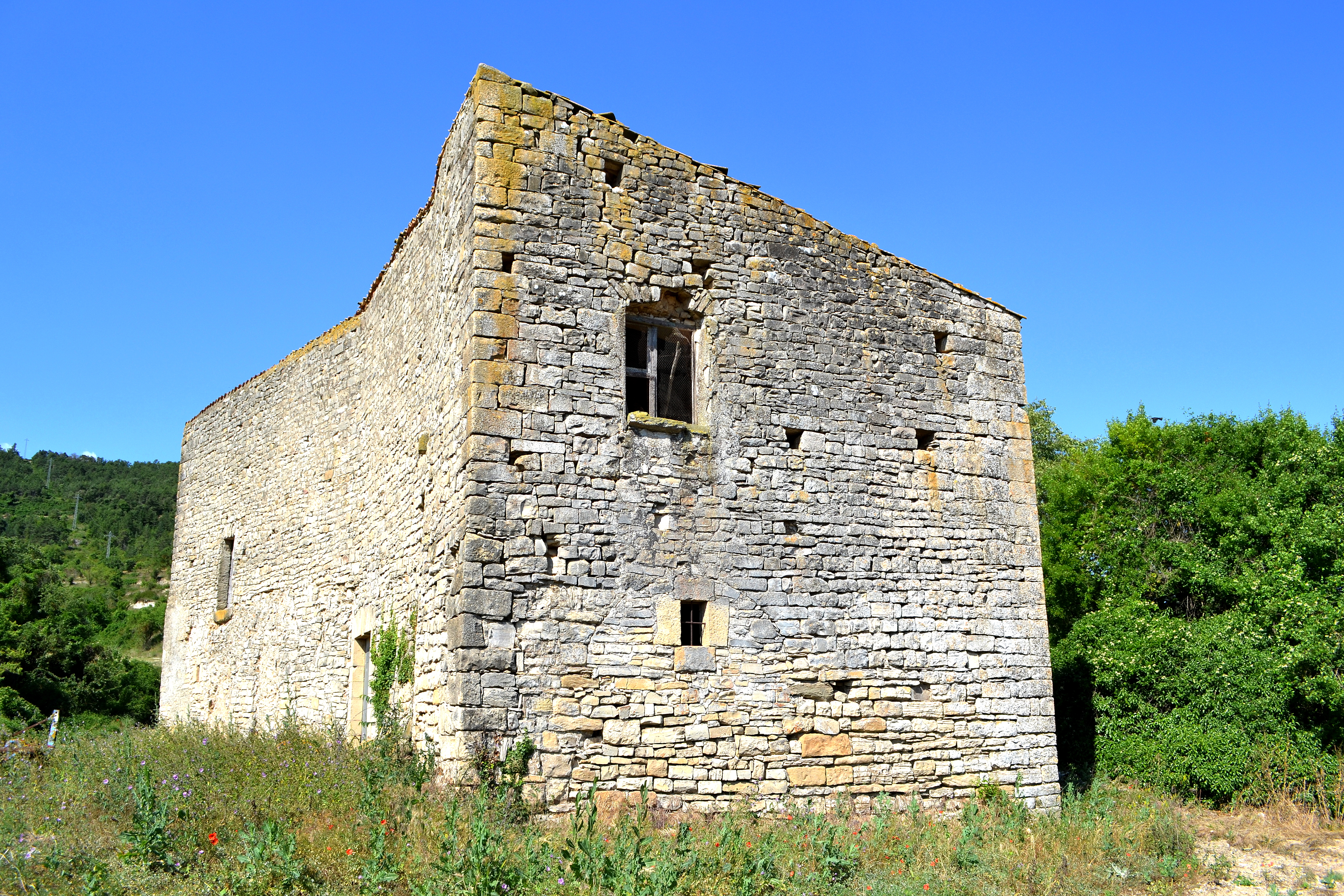 Castell de Llorac